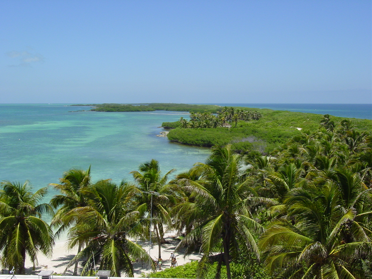 Isla Contoy, Mexico.